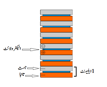 بیٹری